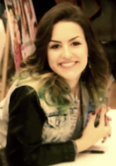 Sessão de Autógrafos na #CHdeMaio, o qual Niina Secrets, Keféra Buchmann, Japa e Bruna Vieira foram capa.